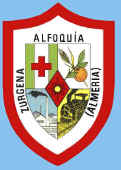 Este es el escudo de La Alfoquía.